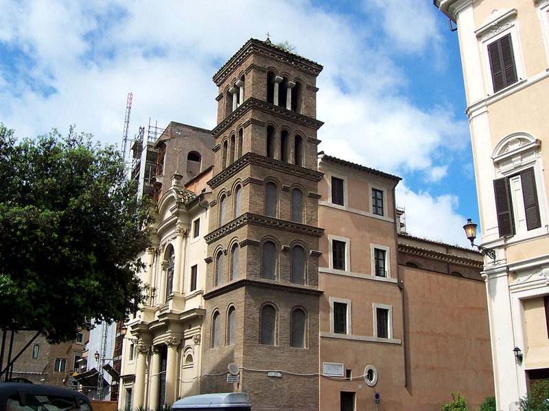 Roma - Chiesa di S. Maria in Monticelli